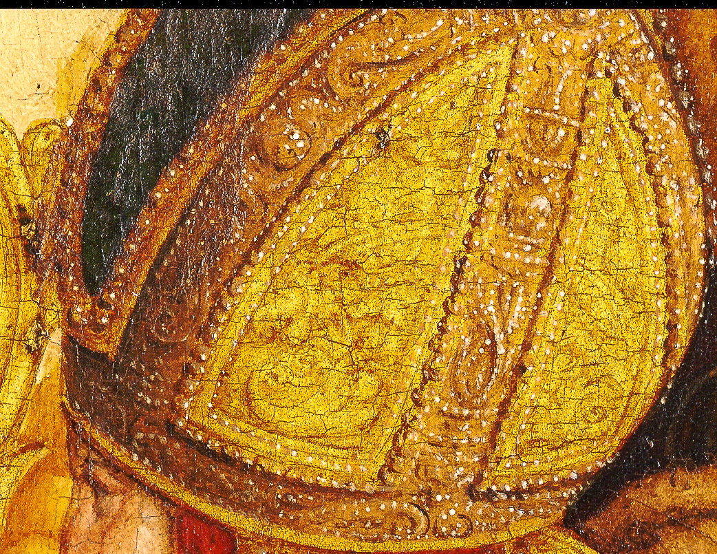 Detail der Mitteltafel: Der heilige Erasmus